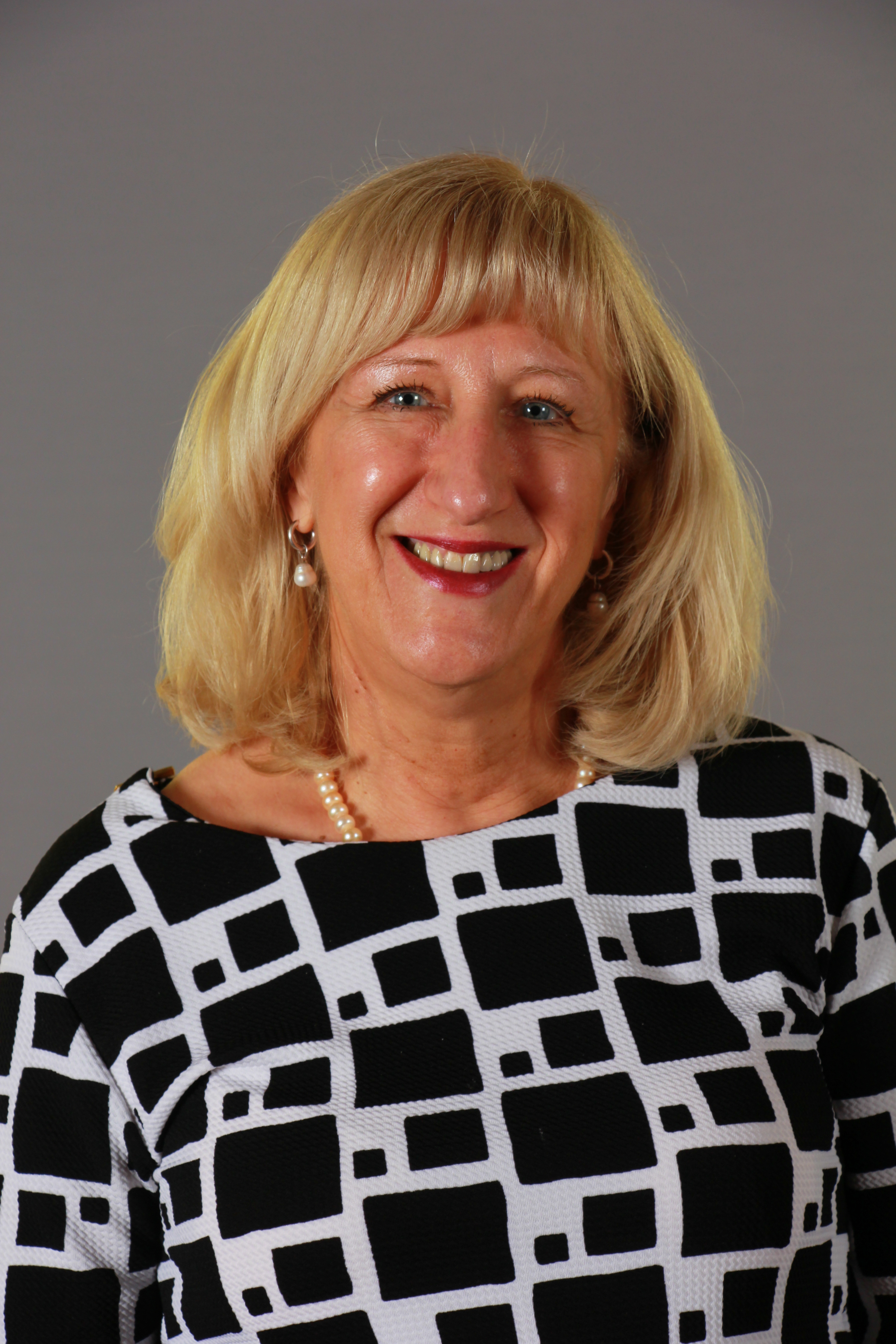 Ingrid Winkler, Bundesratsabgeordnete (SPÖ) aus Niederösterreich